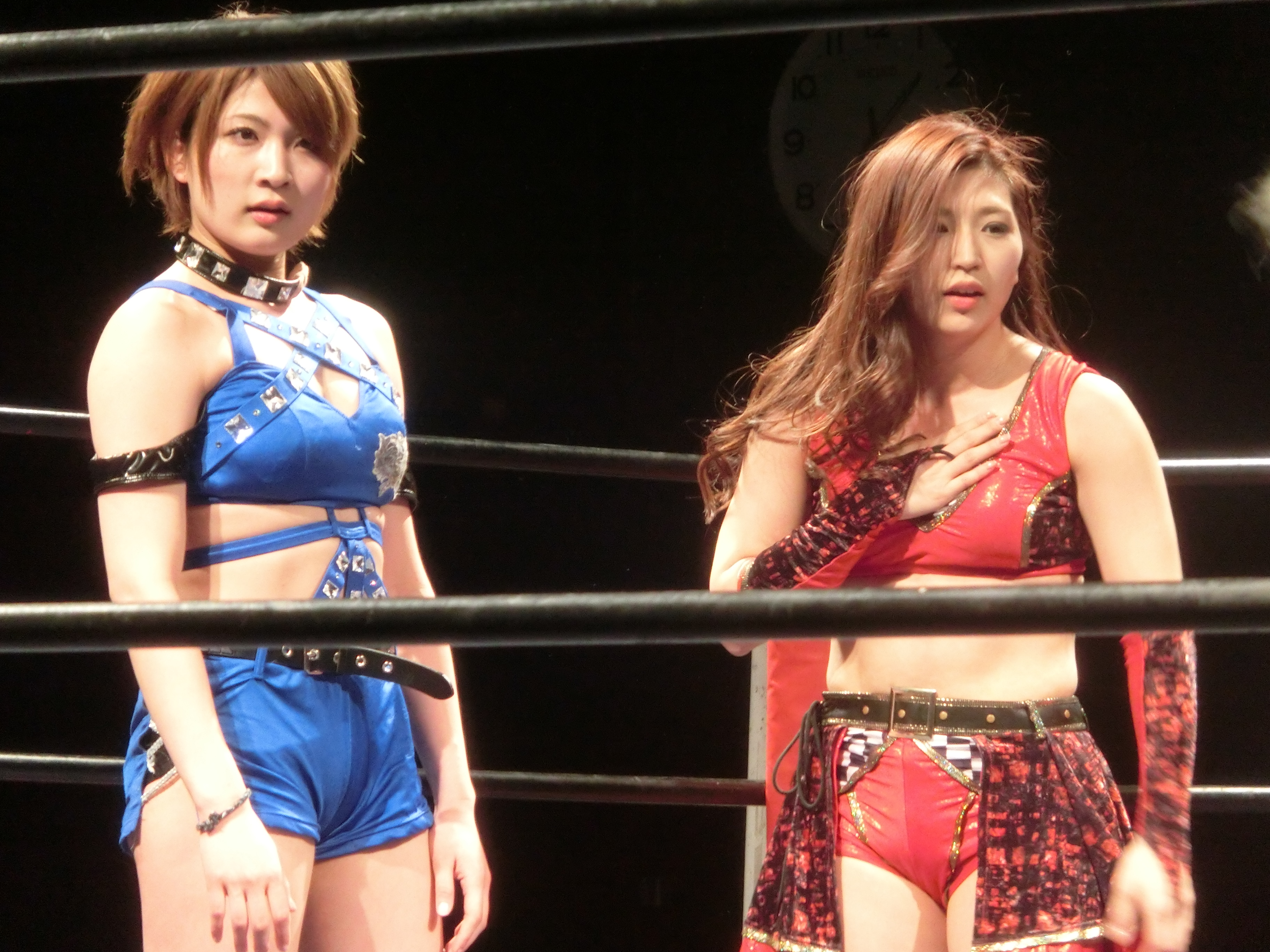 beginning